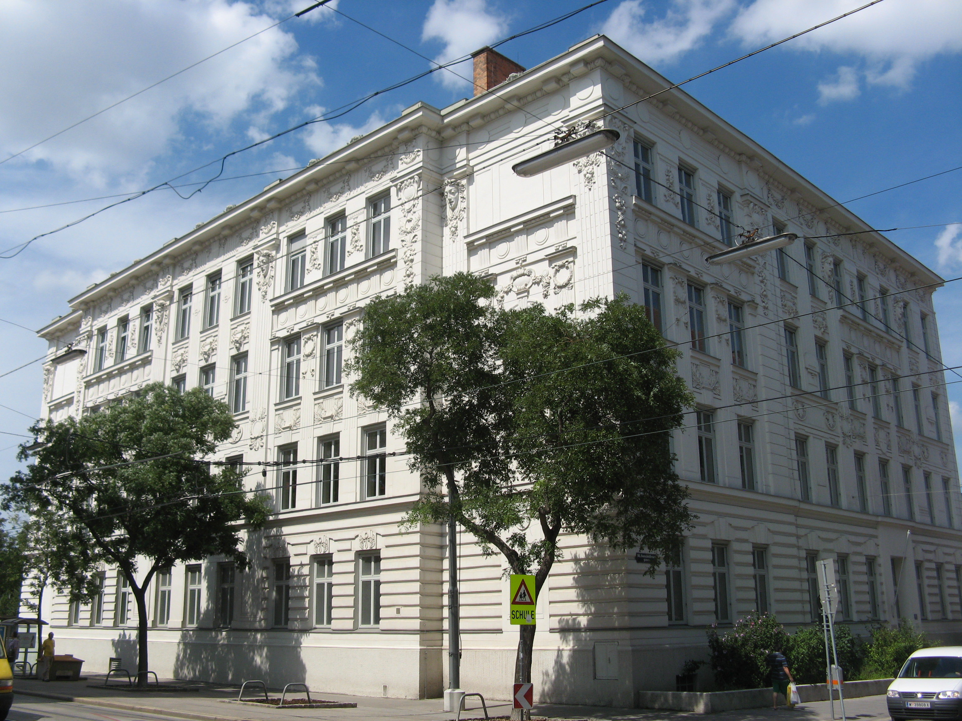 Schule (1903), Quellenstraße 142, Wien-Favoriten